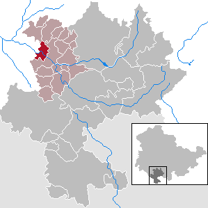 Henfstädt in Thuringia - district Hildburghausen